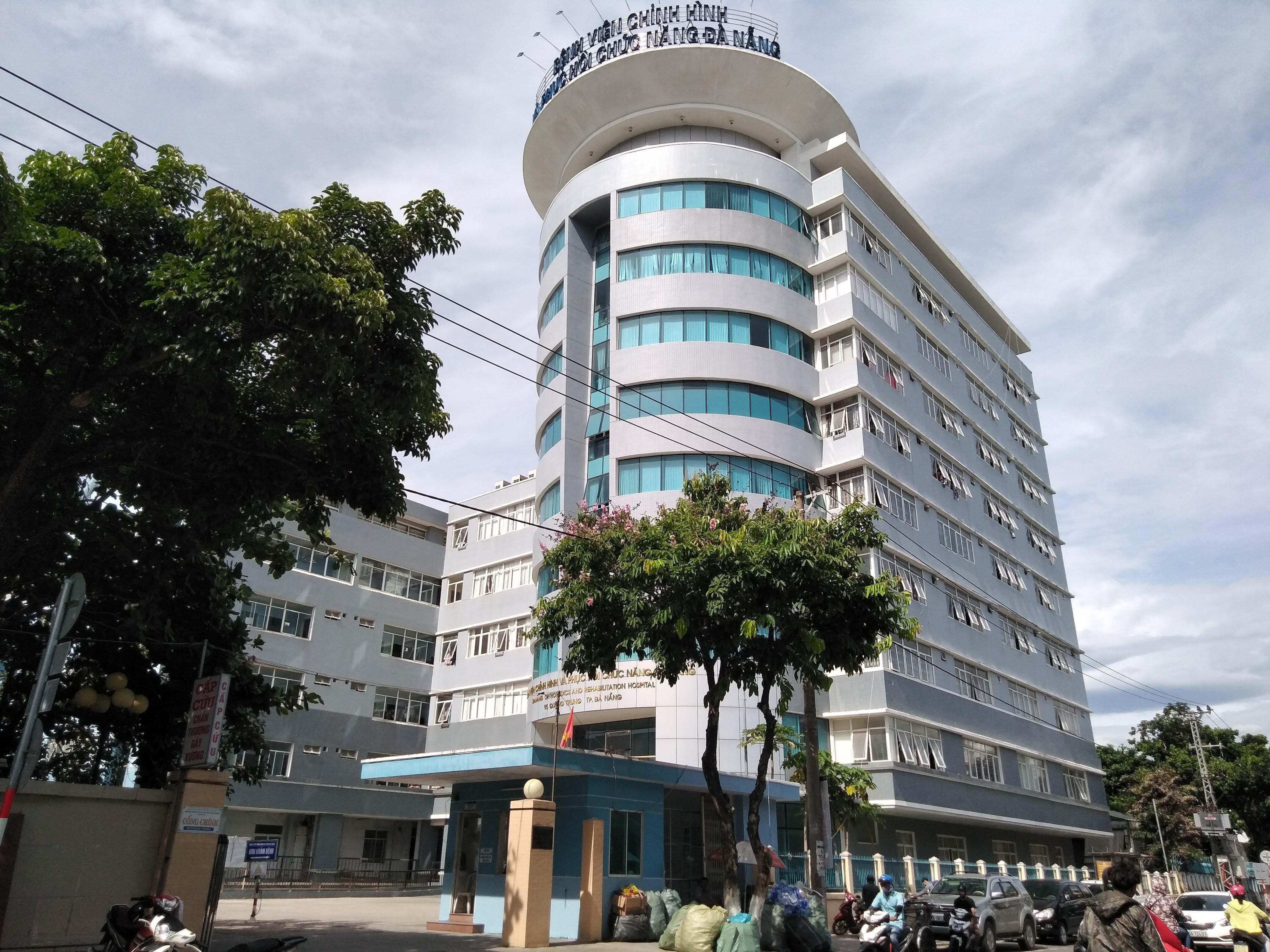 Bệnh viện Chỉnh hình và Phục hồi Chức năng Đà Nẵng